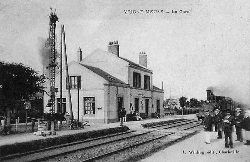 Le bâtiment voyageurs de la gare de Vrigne-Meuse et la ligne principale. L'embranchement vers Vrigne-aux-Bois passe devant l'autre façade de la gare.